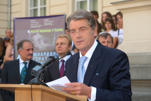 Президент України Віктор Ющенко на відкритті 16-го Форуму